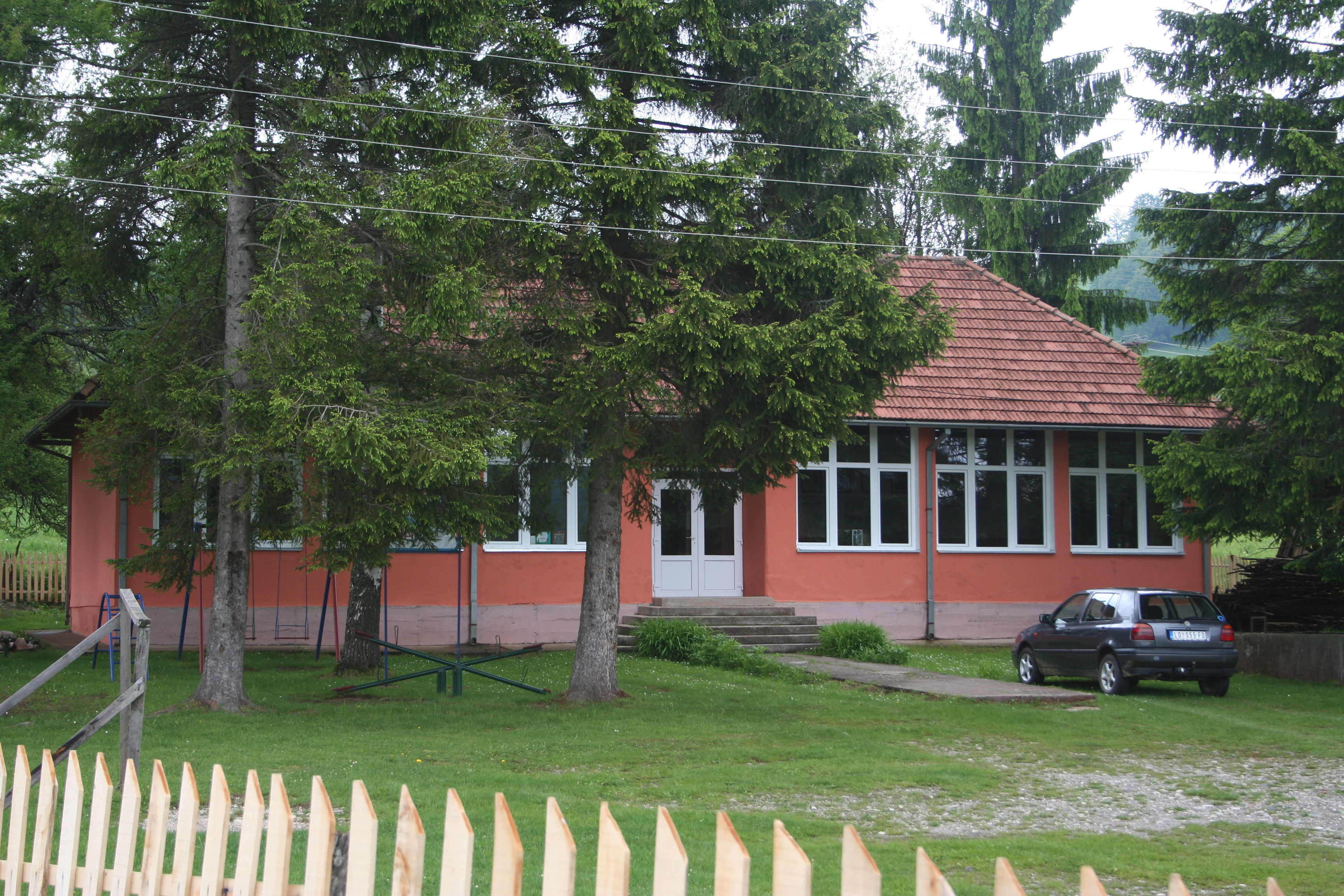 Pašina Ravan, Zarožje